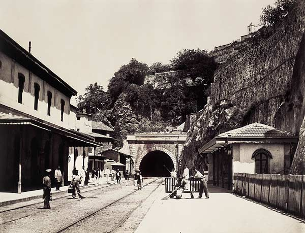 "Vienne. Souterrain", Vers 1861 Album Chemin de fer de Paris à Lyon et à la Méditerranée [Paris], [Compagnie PLM], [vers 1861-1863]. [69] f. de pl.